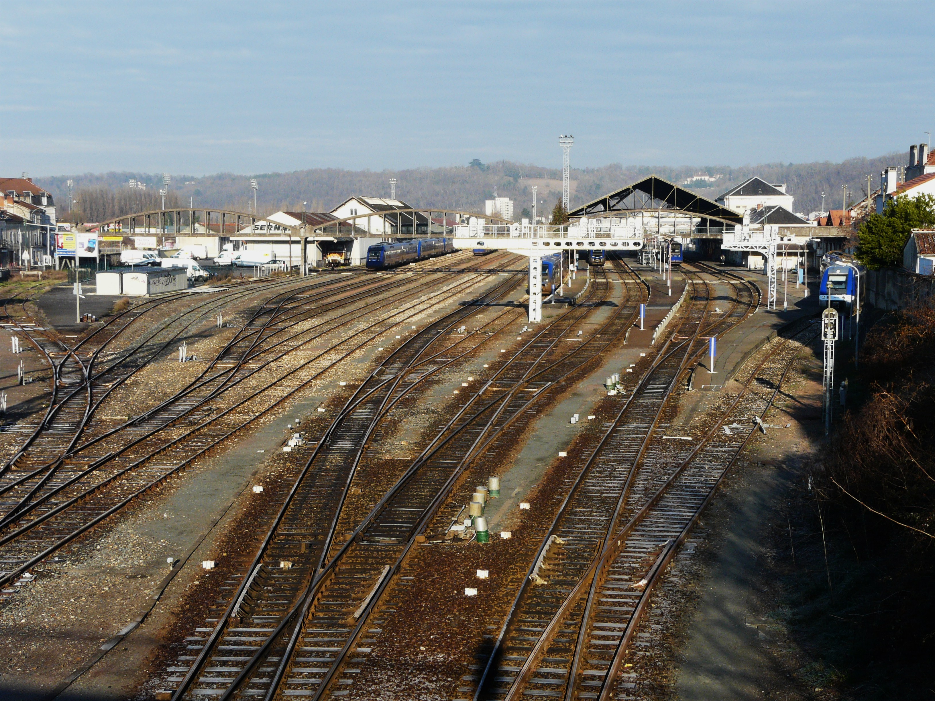 L'ensemble des voies ferrées, Gare de Périgueux, Dordogne, France